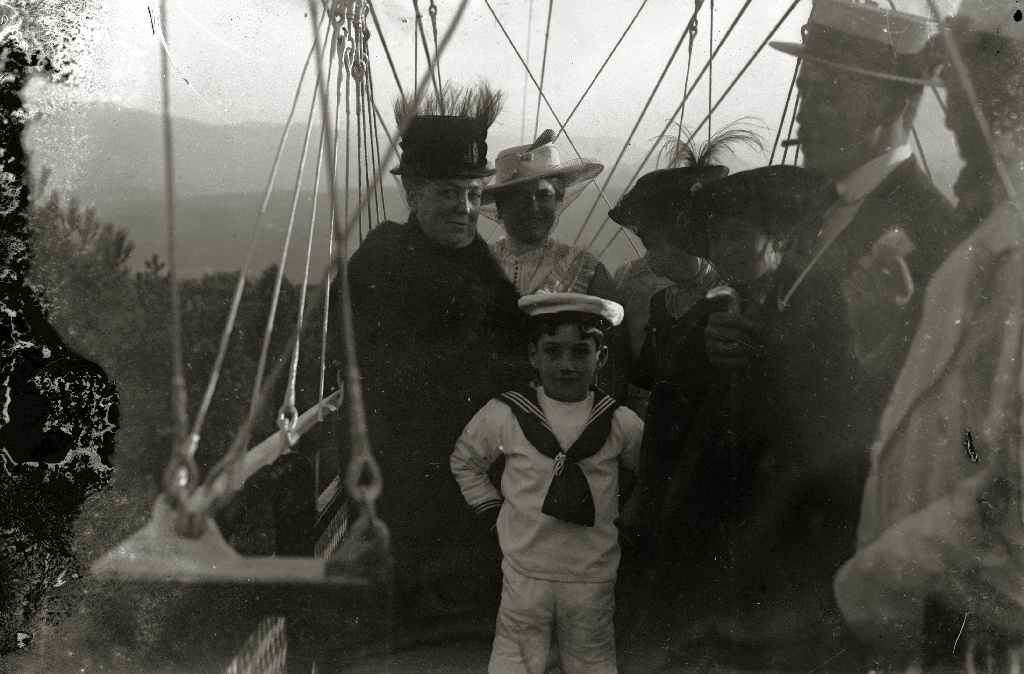 Título original: Grupo de personas en el Teleférico de Ulia (2/2) Localización: San Sebastián (Guipúzcoa)